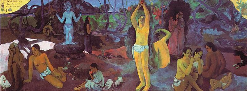 Da dove veniamo? Che siamo? Dove andiamo? o/t, 139x375 cm, Museum of Fine Arts, Boston